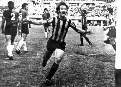 Aldo Poy festeja el gol de palomita ante Newell's.